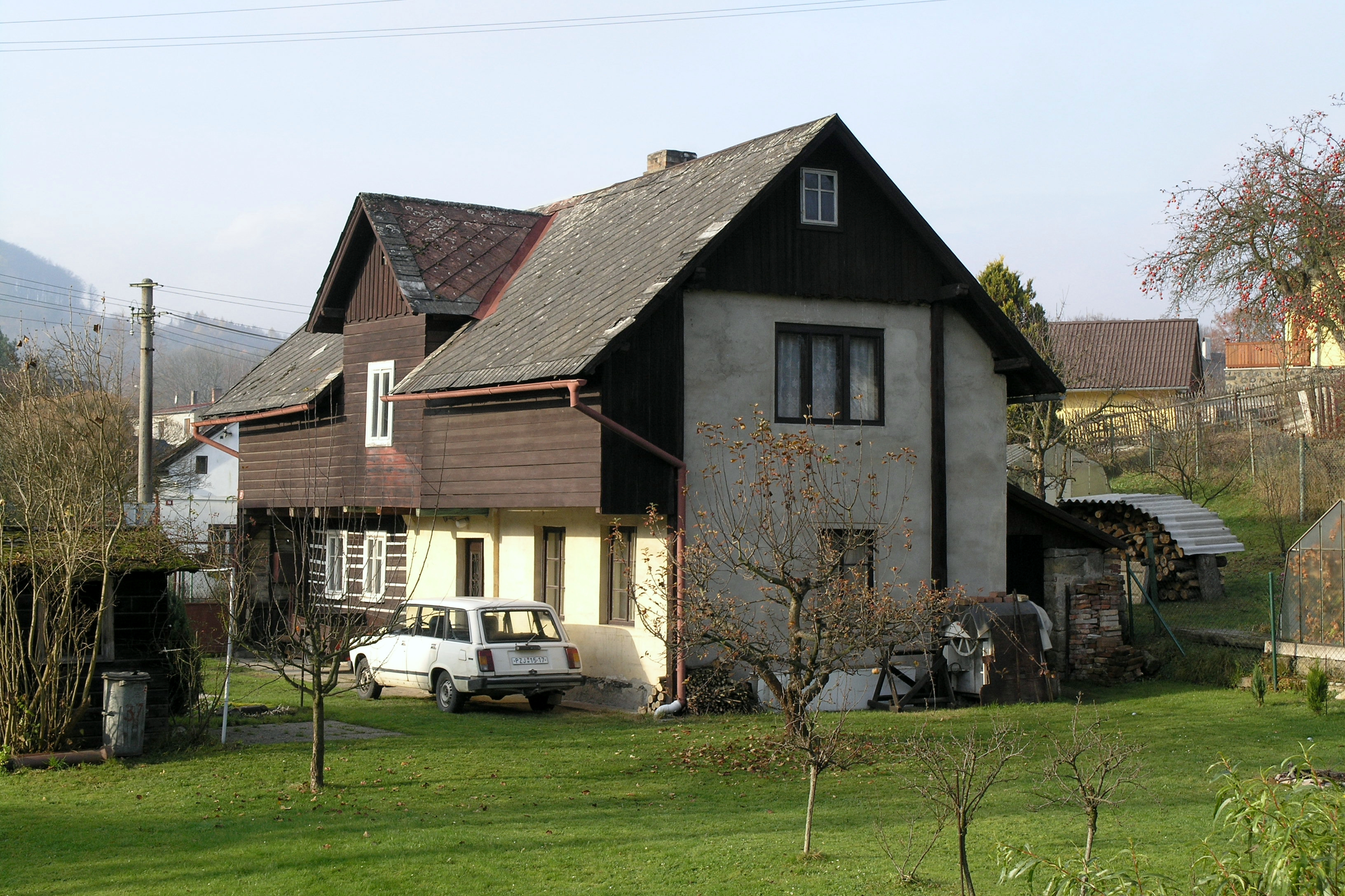 Chotovice v okrese Česká Lípa, ČR